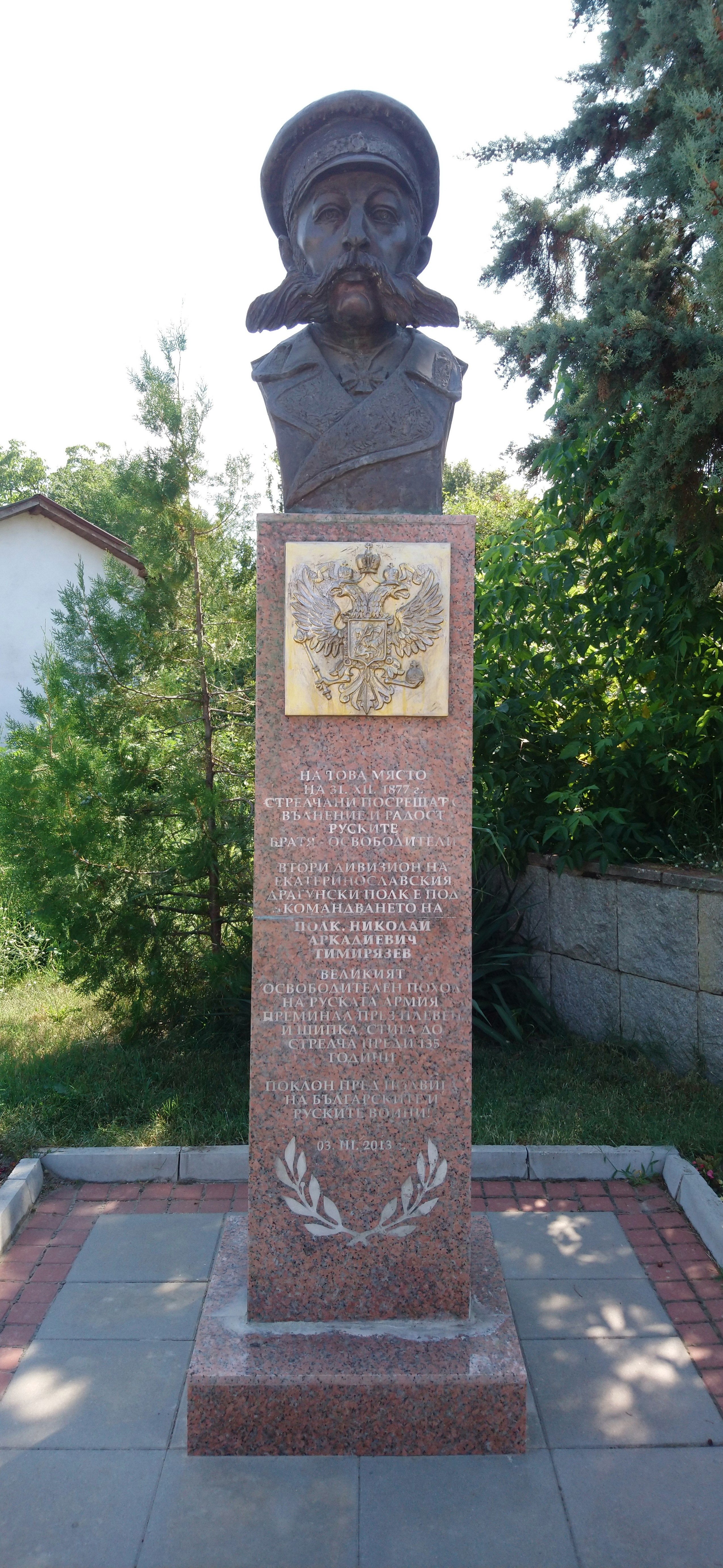 Бюст паметник на генерал Николай Аркадиевич Тимирязев, град Стрелча